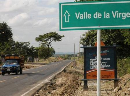 Llegada a la parroquia